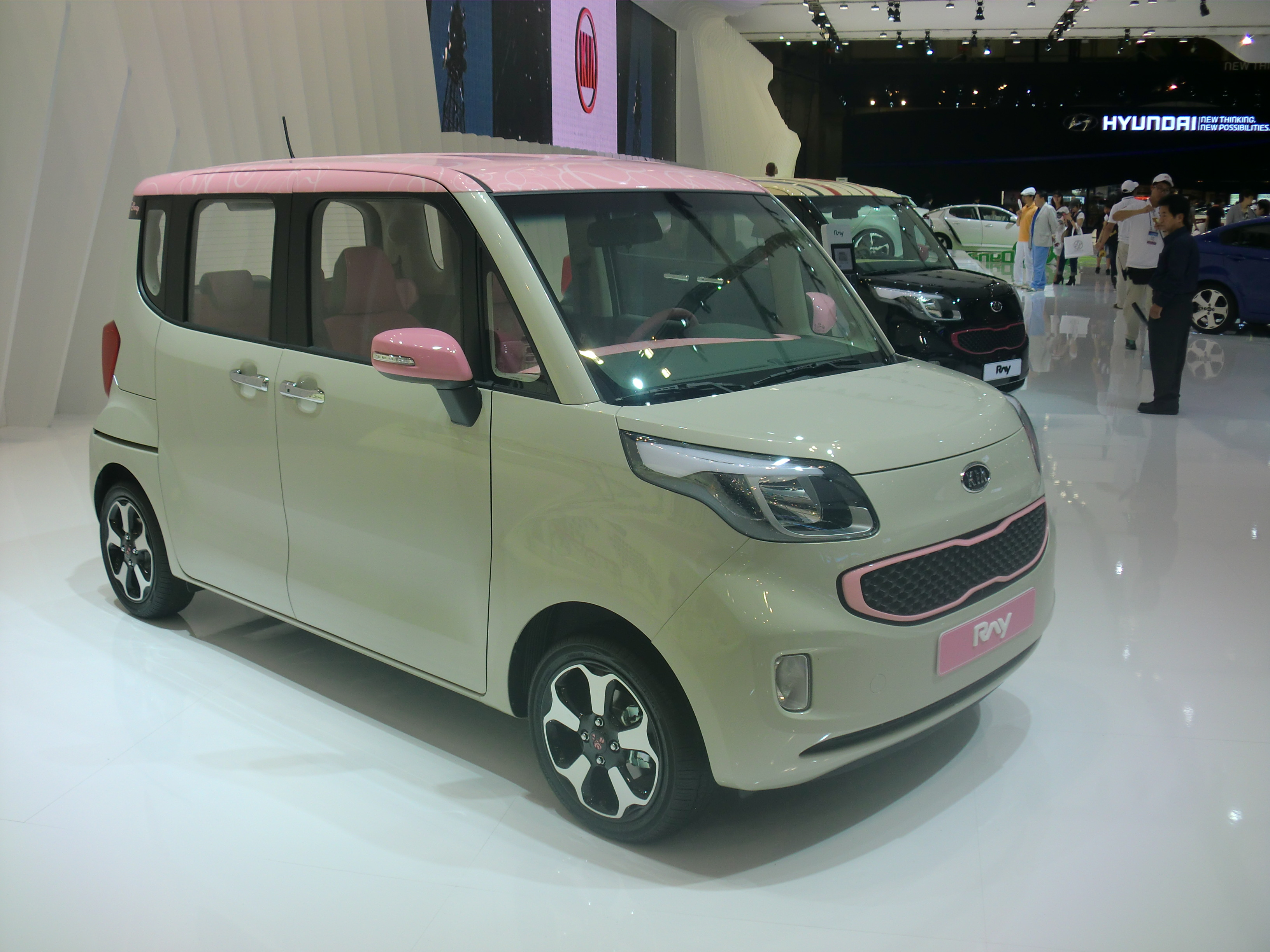 2012부산국제모터쇼에 전시된 기아 레이